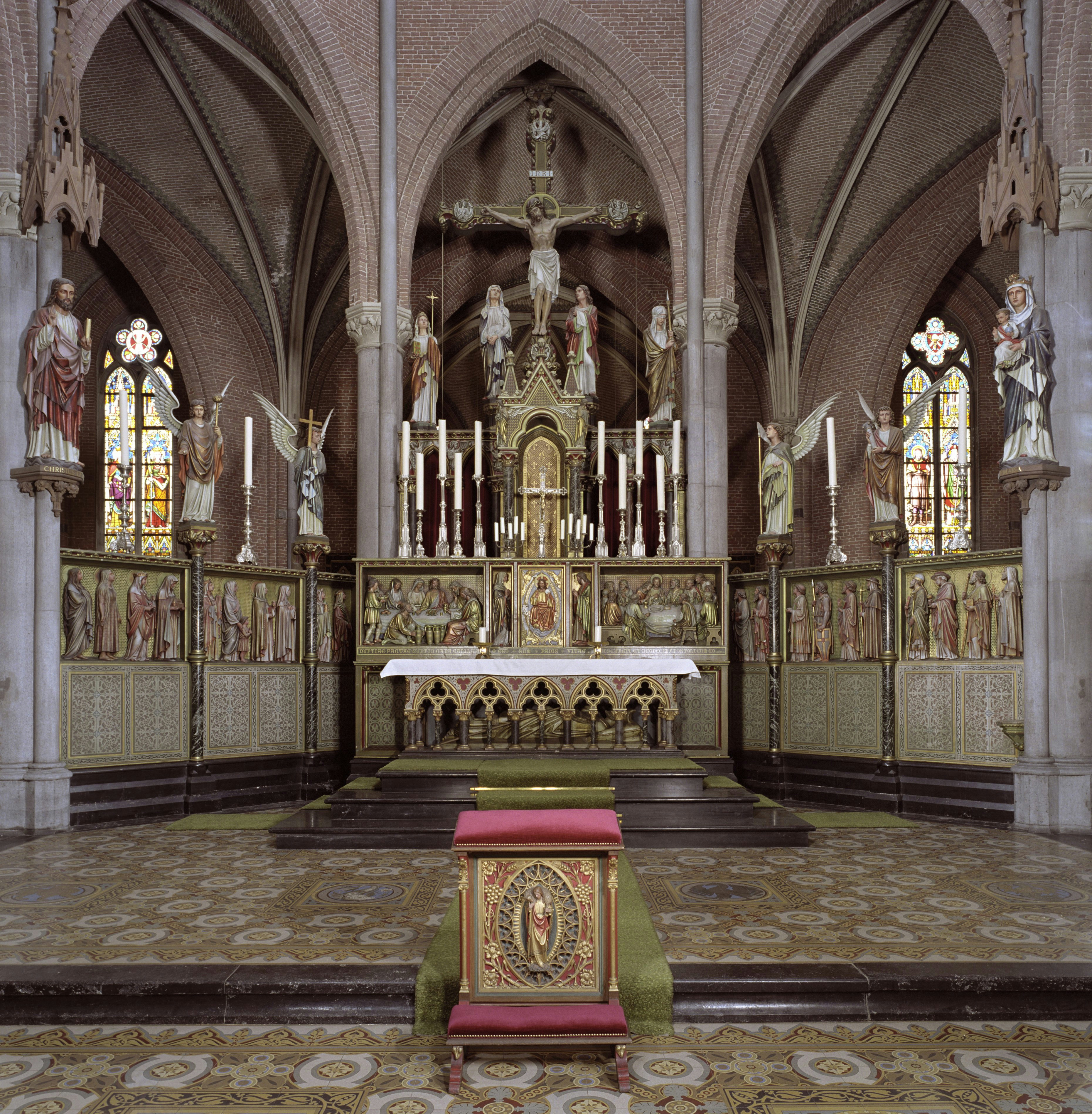 Sint Lambertuskerk: Interieur, overzicht van altaar (opmerking: Gefotografeerd voor de publicatie van het boek Pierre Cuypers, architect van 1827 tot 1921)